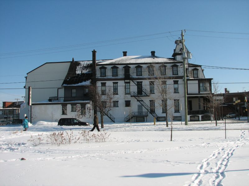 Photo de l'hotel le Grand Union de Victoriaville (pris par moi-même)